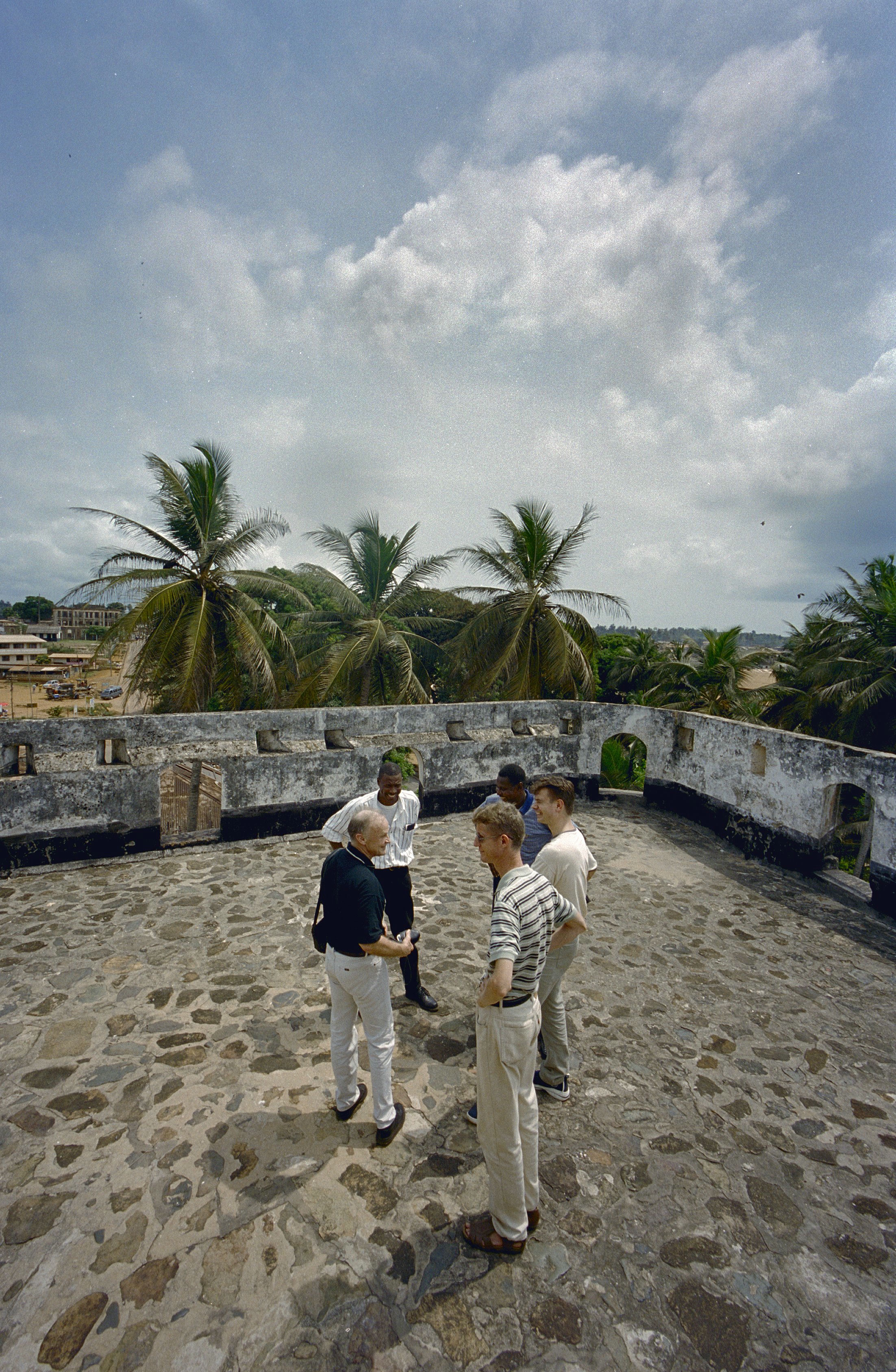 Fort Saint Anthony: Overzicht bovenop bastion rechts voor (opmerking: Ghana reis Loek Tangel)